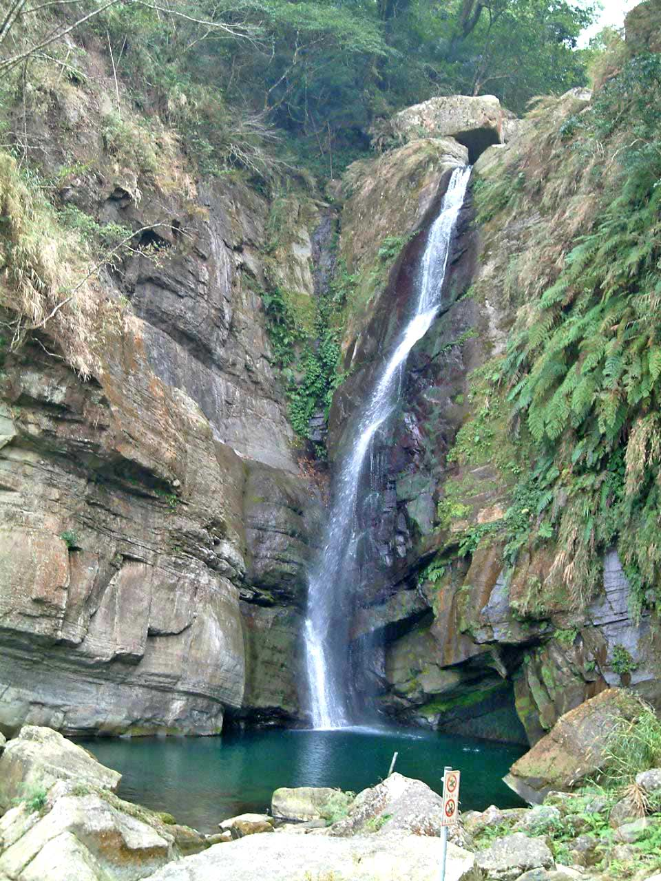 雲潭瀑布上層，落差約35公尺。